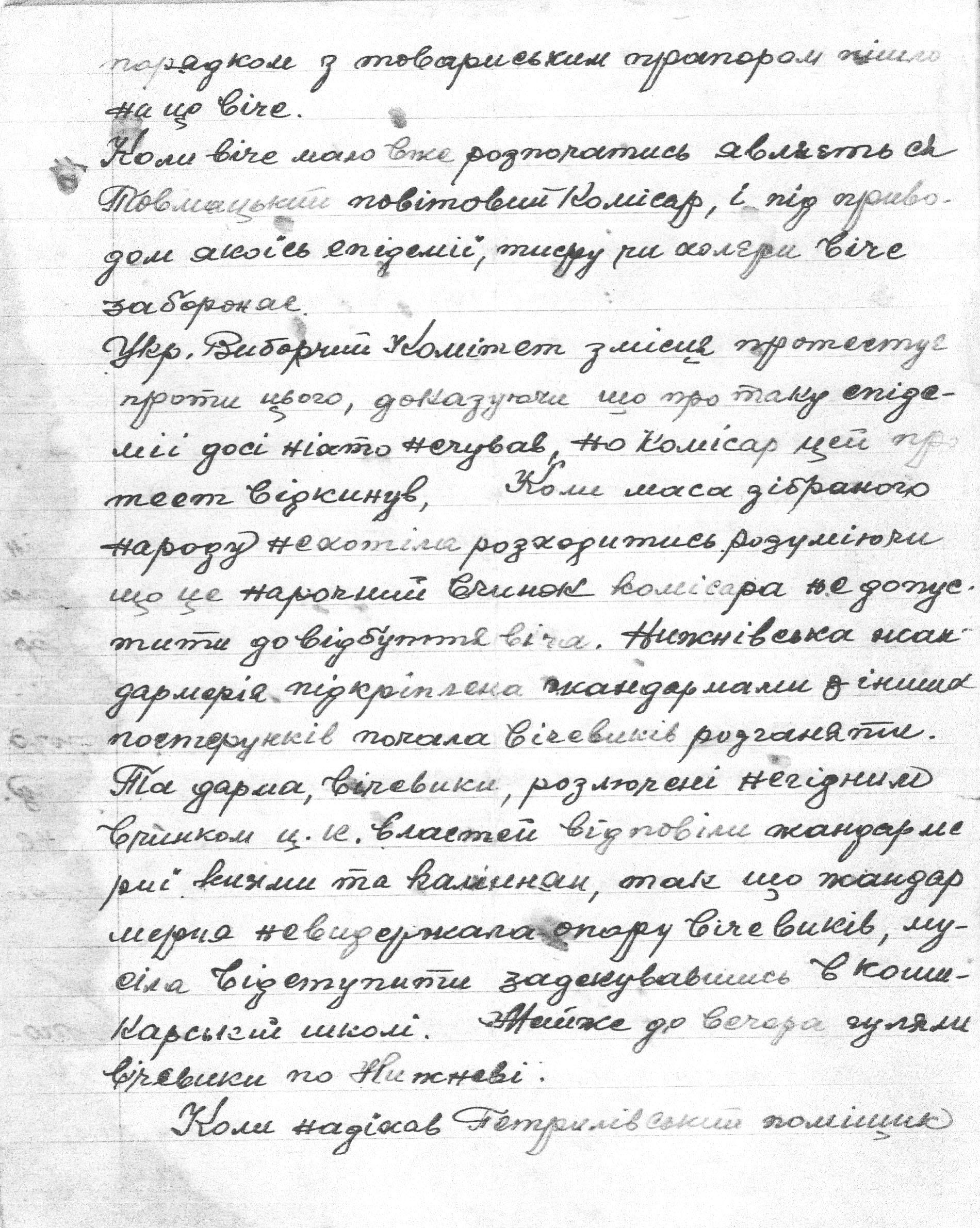 Копія рукопису